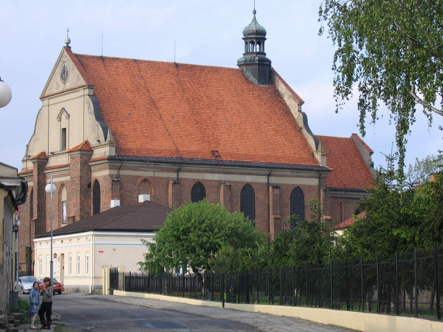 Kościół pw. św. Wawrzyńca, Słupca, widok od ul. Kościelnej (zabytek nr rejestr. 59/623)